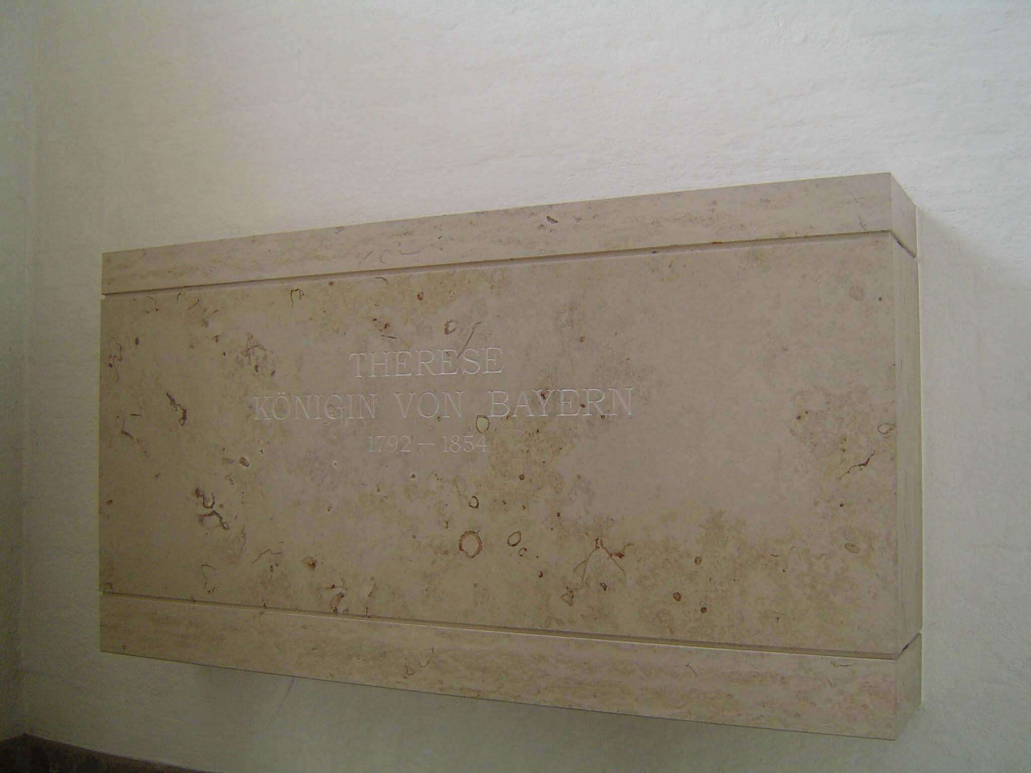 Tumba de Teresa de Sajonia-Altenburgo, reina de Baviera